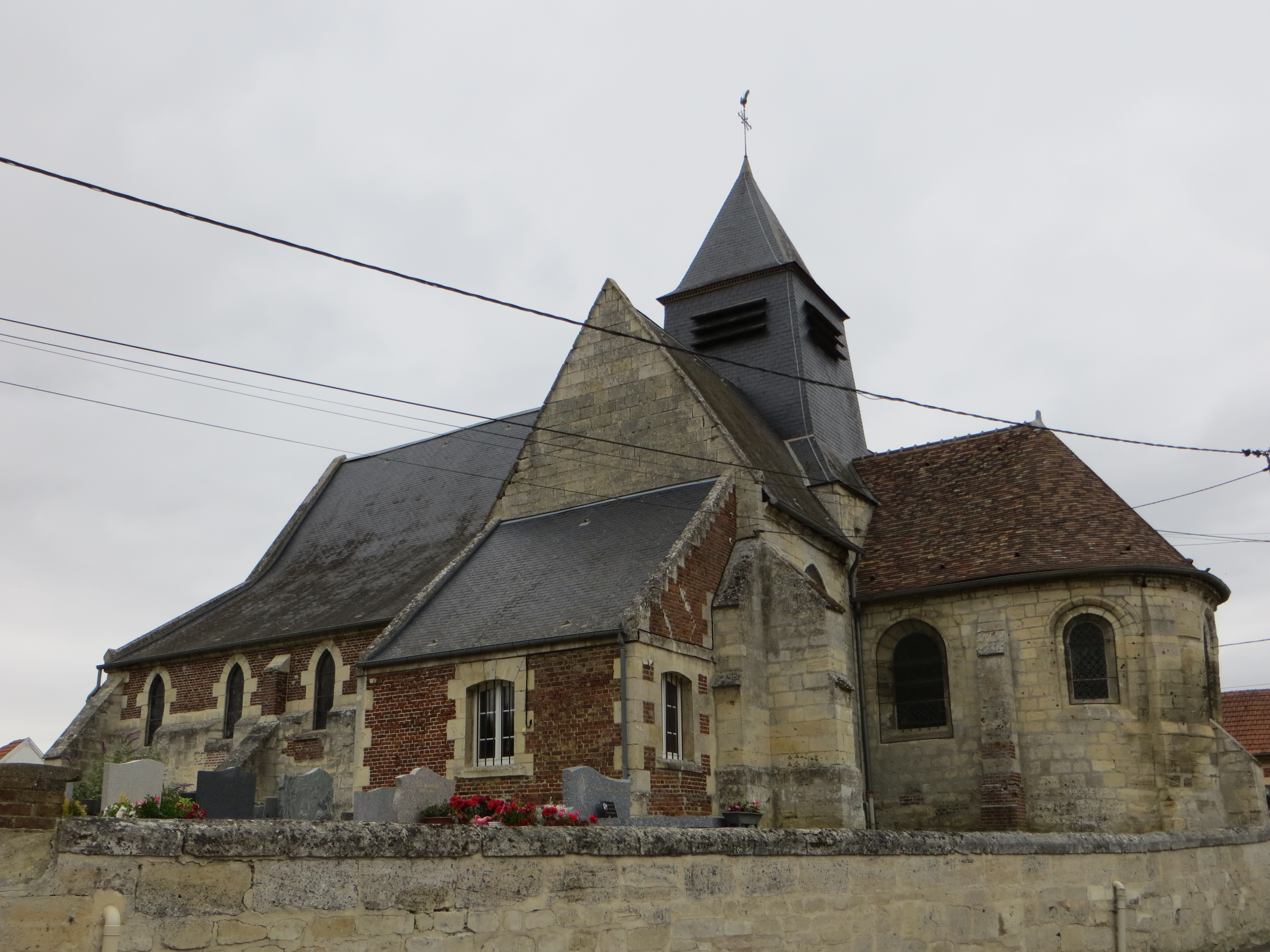 Vue générale de l'église